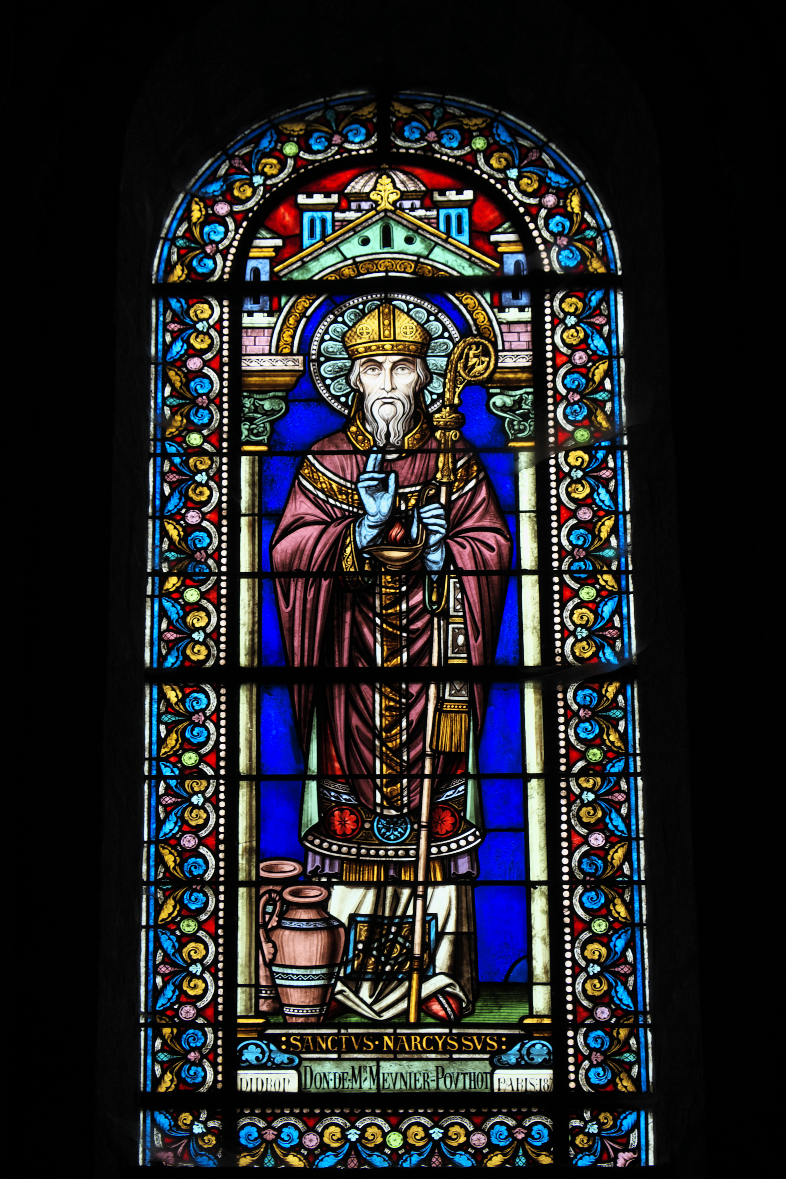 Kirche Saint-Barthélémy in Bénévent-l’Abbaye im Département Creuse (Nouvelle-Aquitaine/Frankreich), Bleiglasfenster mit der Signatur: DIDRON PARIS 187?; Darstellung: Heliger Narcissus von Jerusalem